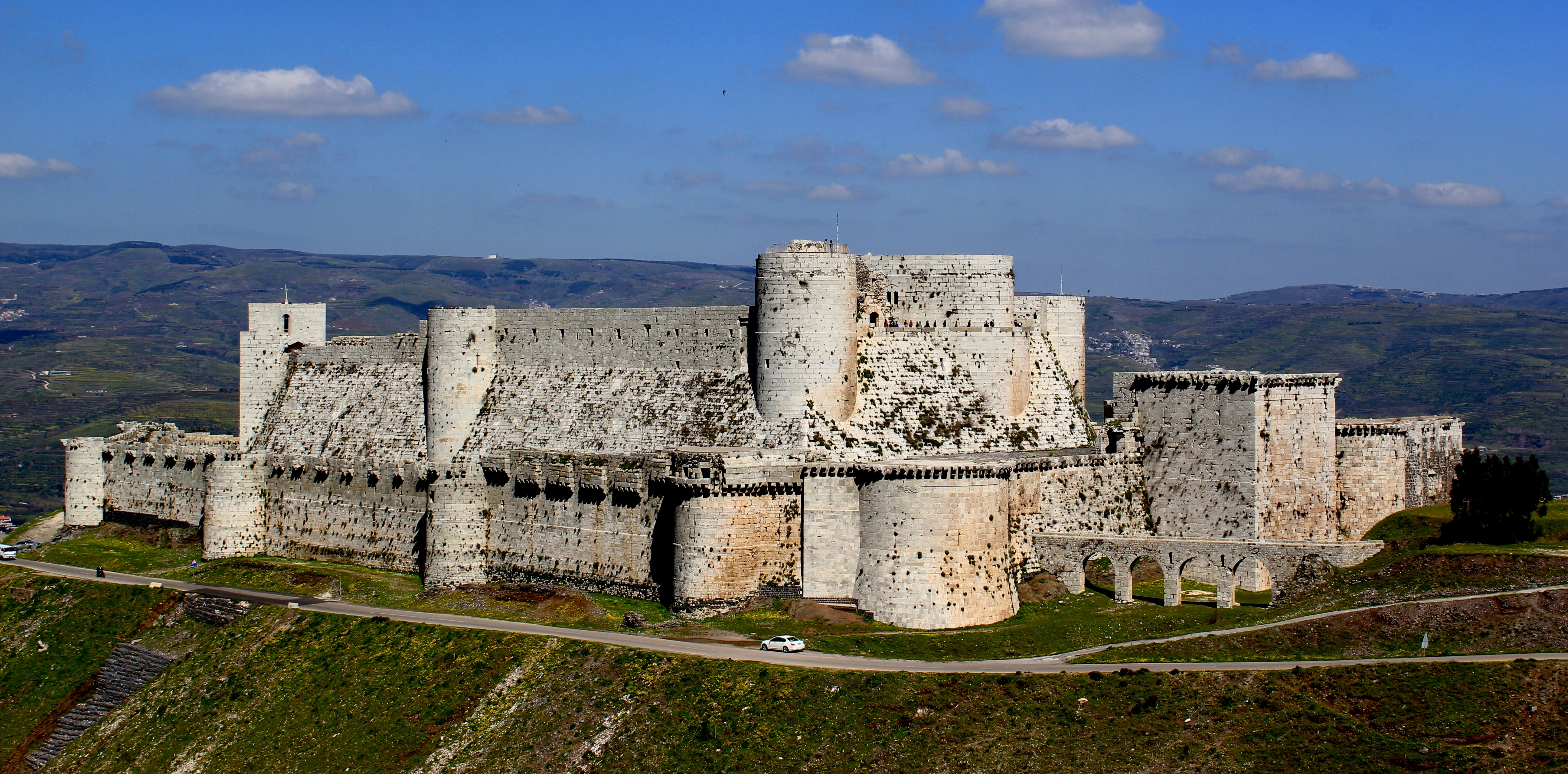 Le Krak des Chevaliers